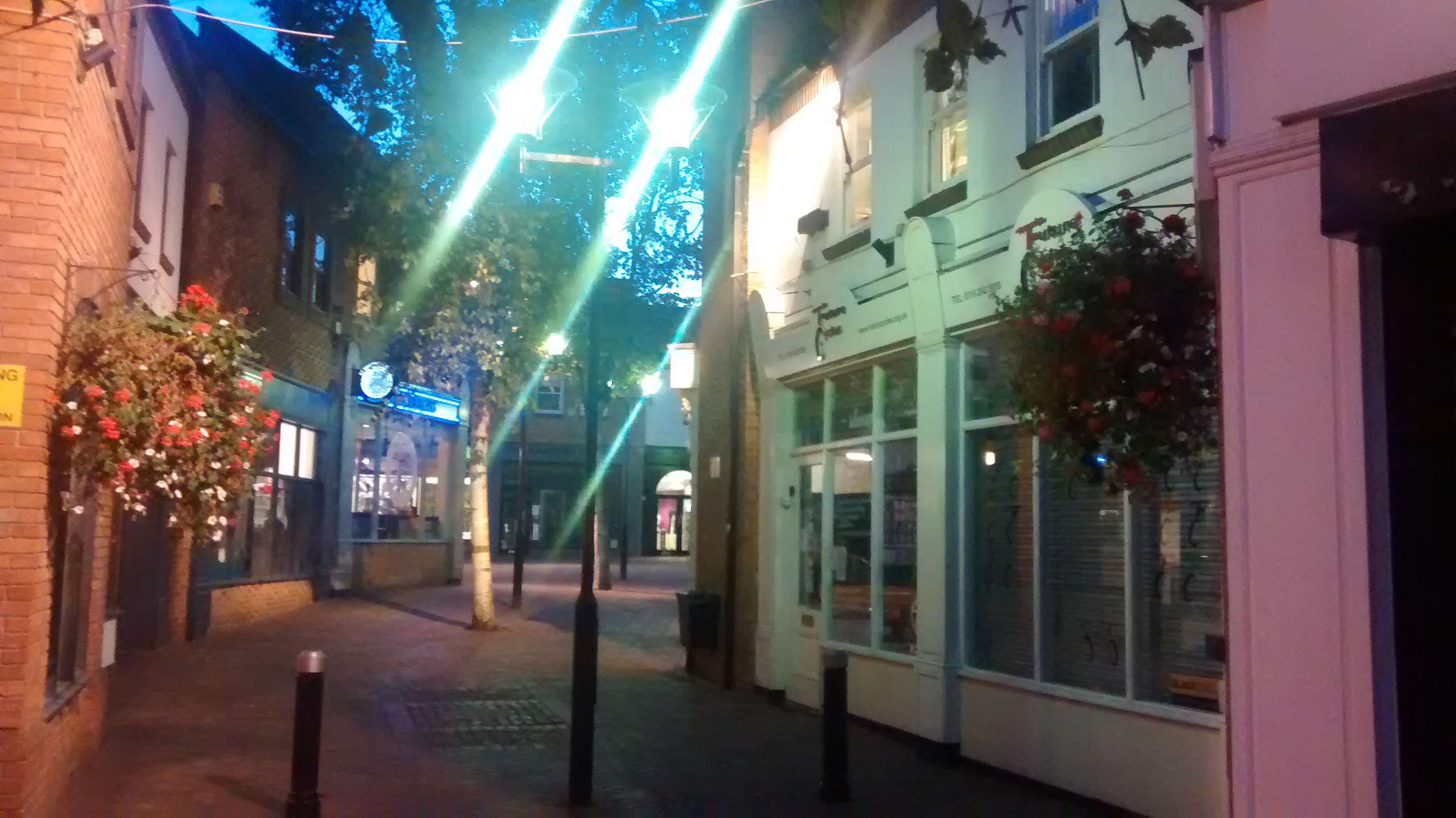 Uliczka w centrum miasta